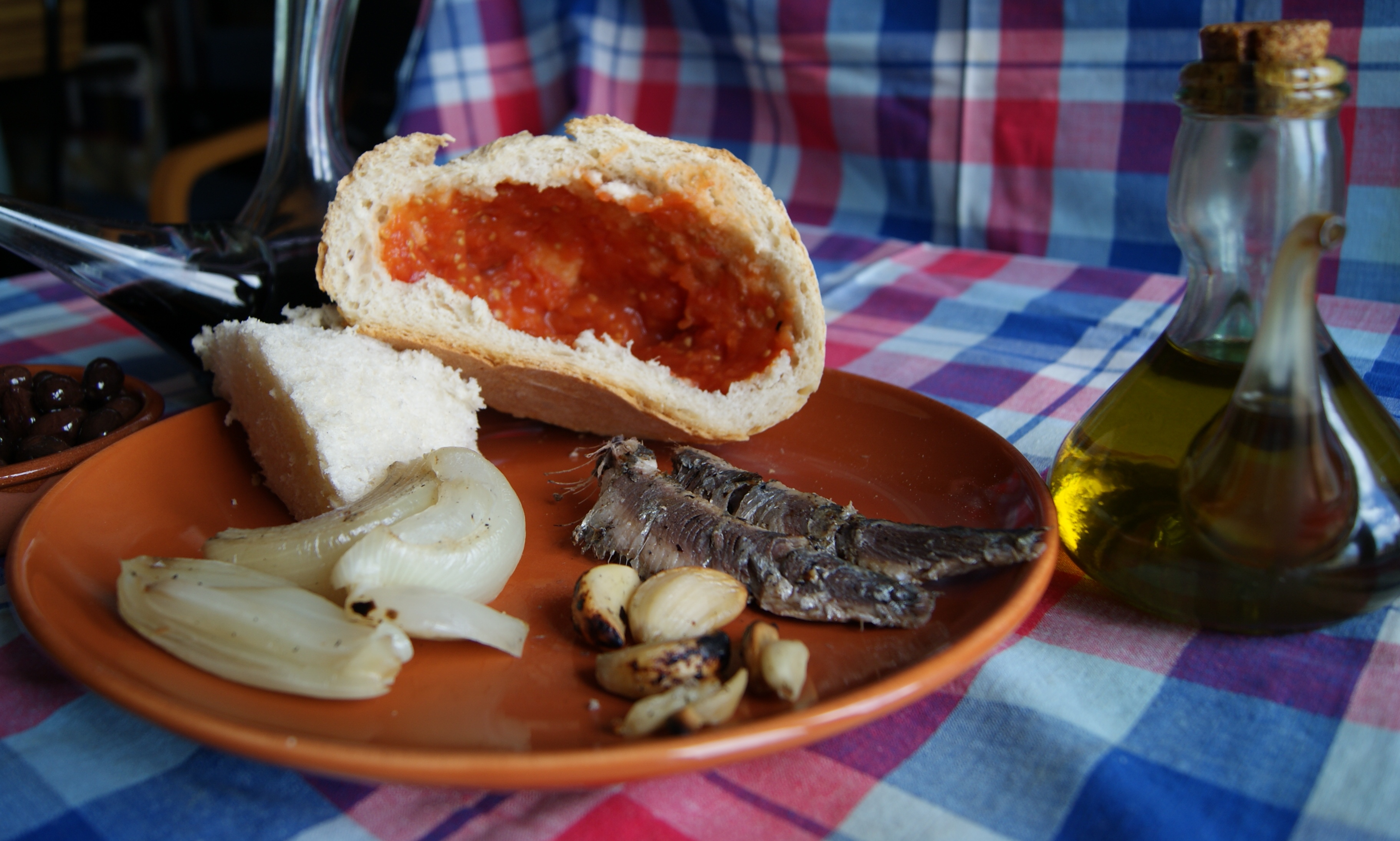 Preparació de la clotxa